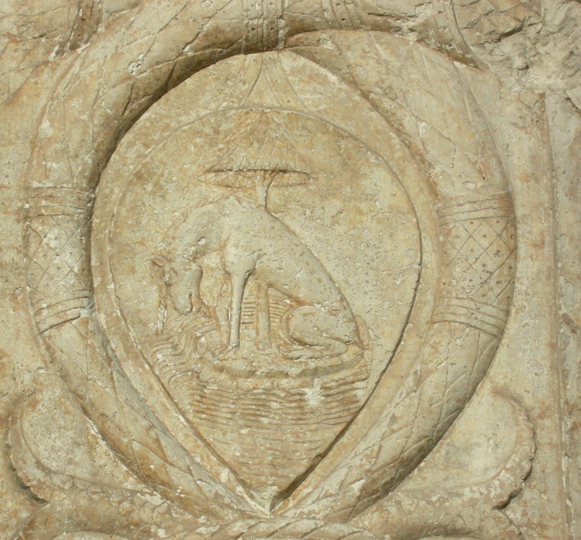 Unicorno scolpito nella parasta del portale di marmo di Palazzo Schifanoia, XV sec., Ferrara, Italia. L'Unicorno è qui raffigurato su di un isolotto delimitato da una siepe di graticcio sotto una palma da dattero con il corno rivolto verso il basso. L'unicorno fu utilizzato dagli Estensi e in particolare da Borso d'Este come impresa personale